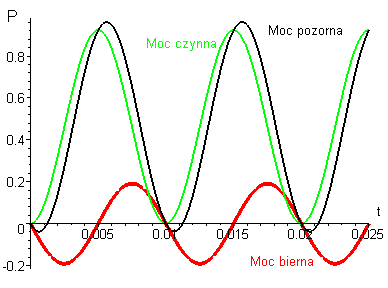 Przebieg mocy czynnej, biernej i chwilowej w czasie pełnego cyklu zmian napięcia.